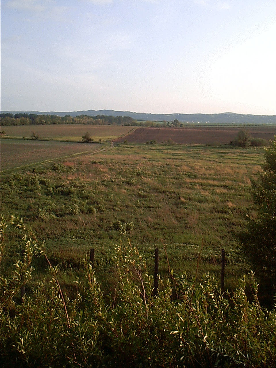 A Sokorói-dombság Győr felől